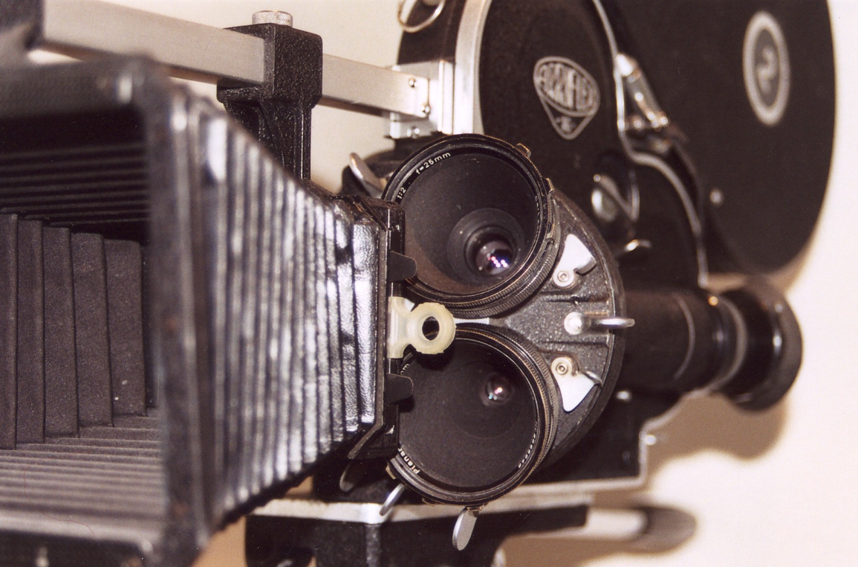 Arriflex 16 från 1972